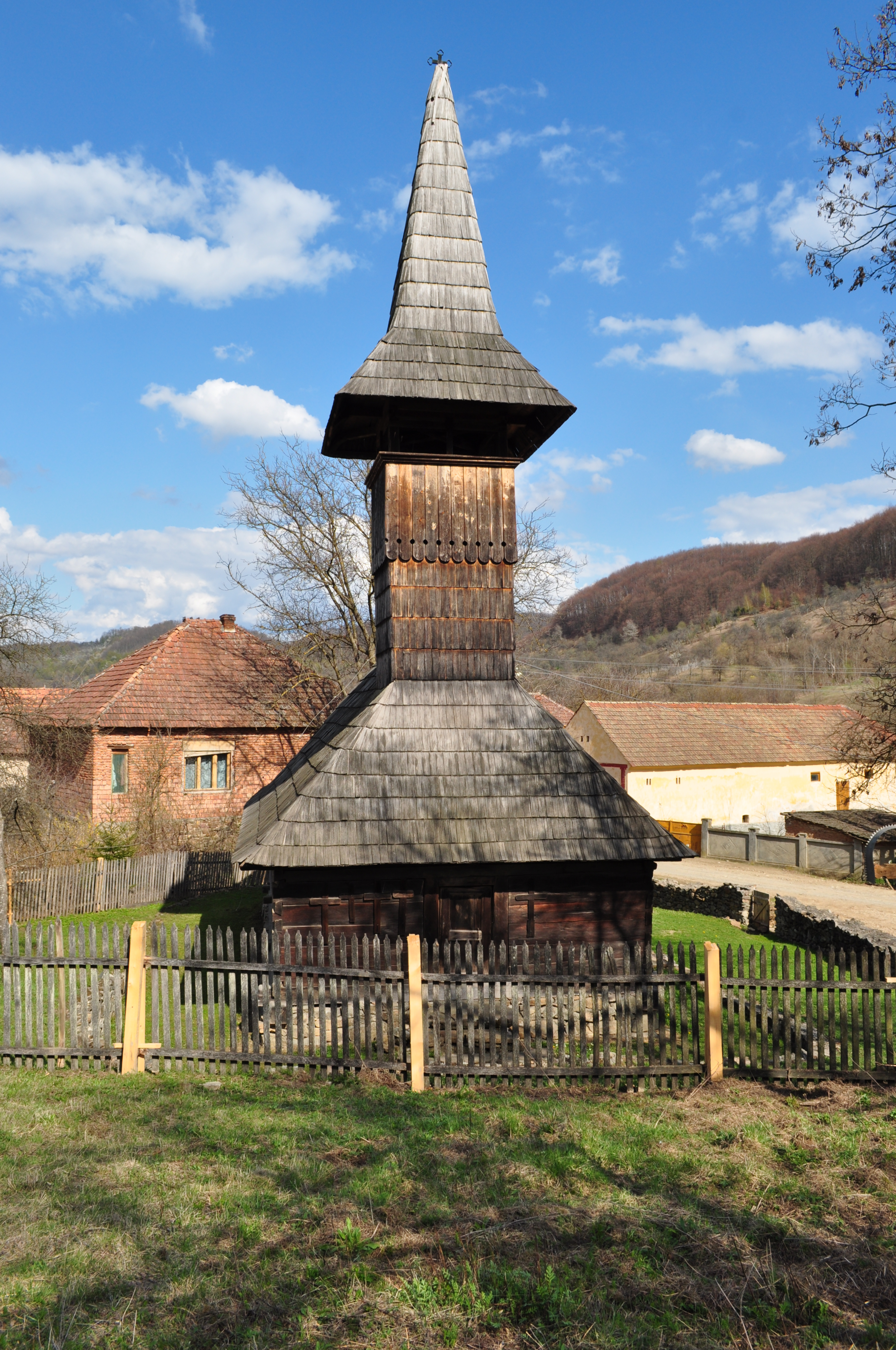 Biserica de lemn "Întâmpinarea Domnului", sat GROŞII NOI; comuna BÂRZAVA